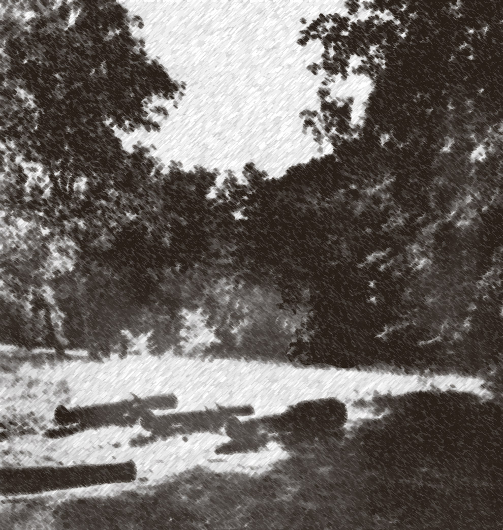 Park Klein-Glienicke, Geschütze vom ehemaligen Geschützplatz, verfremdete Ansicht